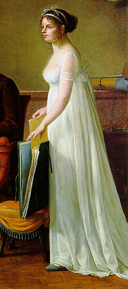 Self-portrait of Marie-Françoise Constance Mayer-La Martinière